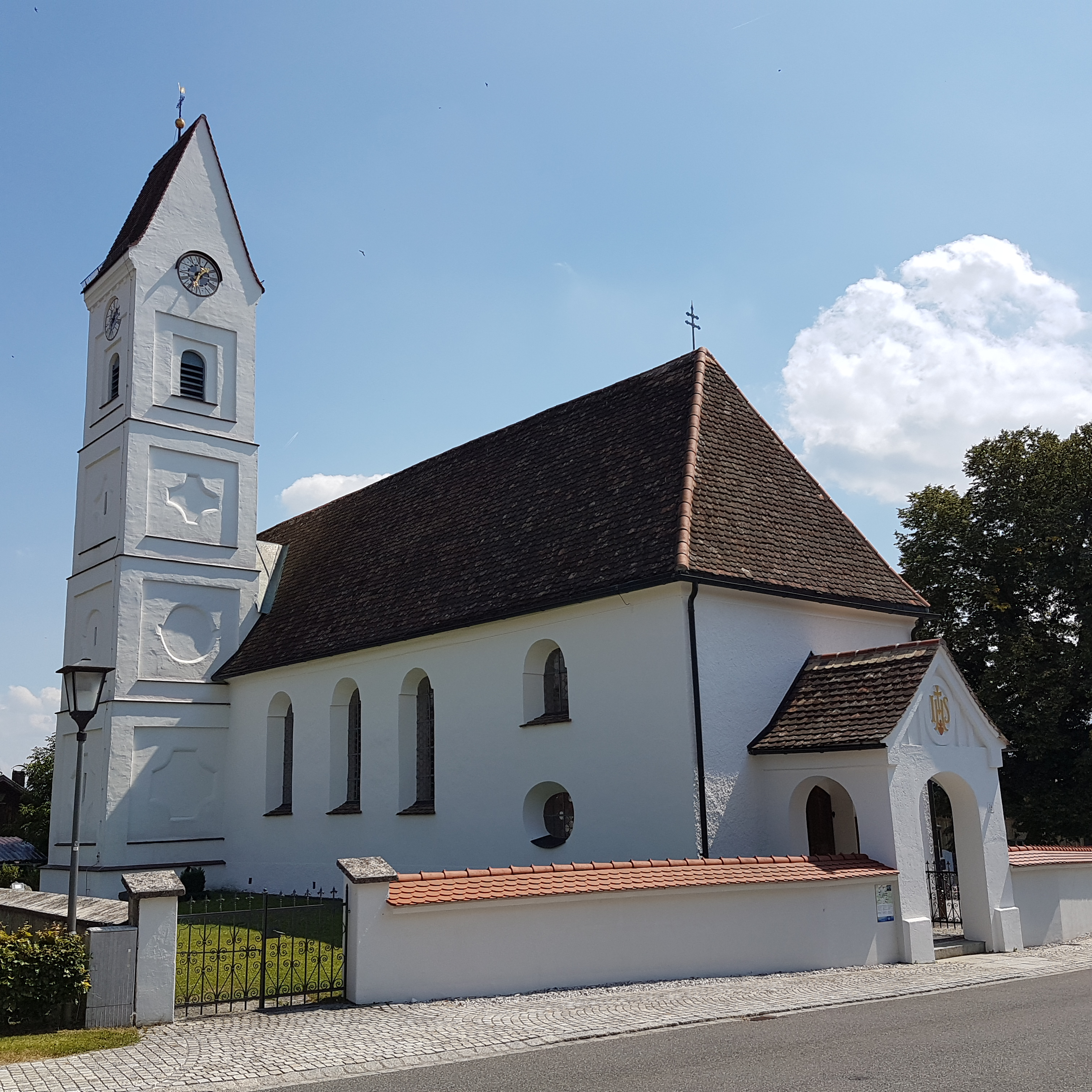 Hofheim (Spatzenhausen), St. Johannes Evangelist